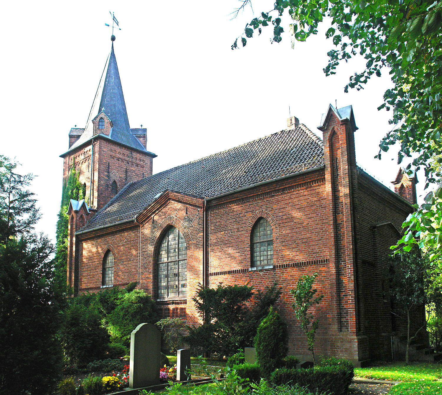 Moorlose Kirche in Mittelsbüren. Frühester neugotischer Kirchenbau in Bremen. Erbaut: 1846-47. Architekt: Anton Theodor Eggers. Das abgebildete Objekt ist ein geschütztes Kulturdenkmal in der Freien Hansestadt Bremen, mit der Nr. 1302 beim Landesamt für Denkmalpflege registriert.